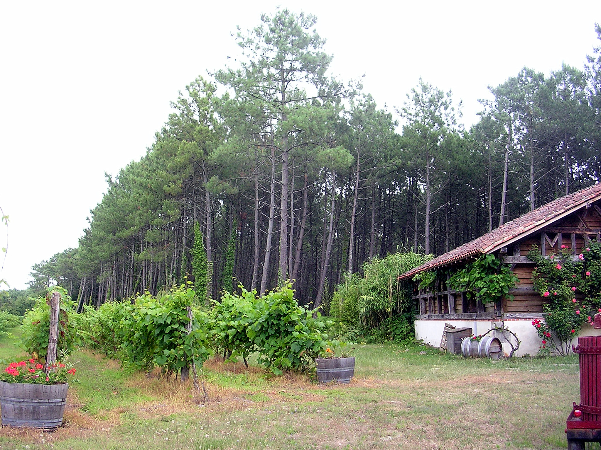 Domaine de Camentron, à Messanges (Landes, France)